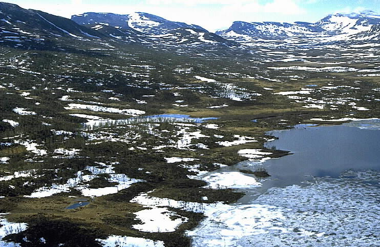 Sjul-Jons Motiv: Bäversjön Nyckelord: Flygbilder Kategori: FjällbygdSjul-Jons.